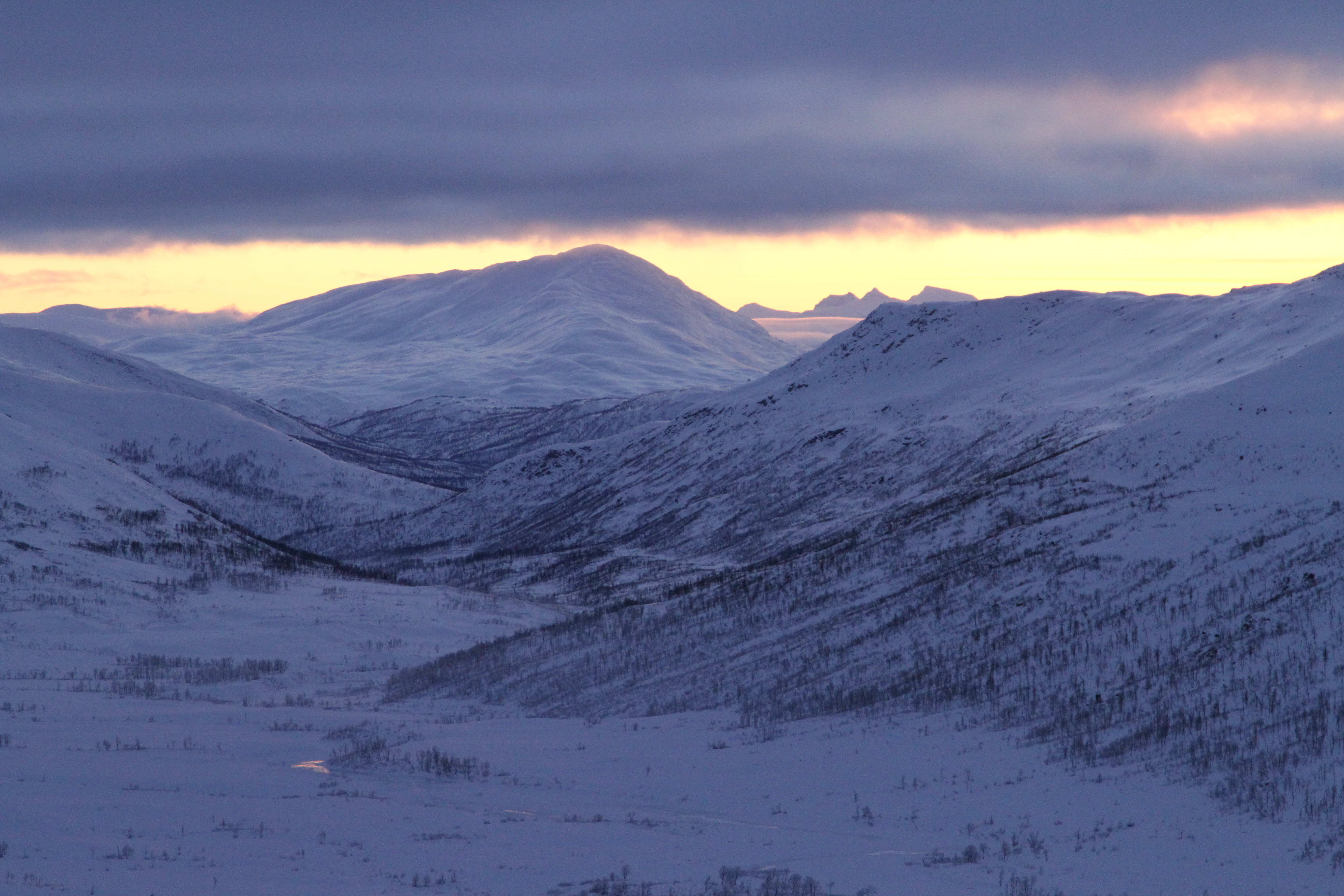 Bjøllådalen er en sidedal til Dunderlandsdalen i Rana og går helt nord mot Saltdal kommune.